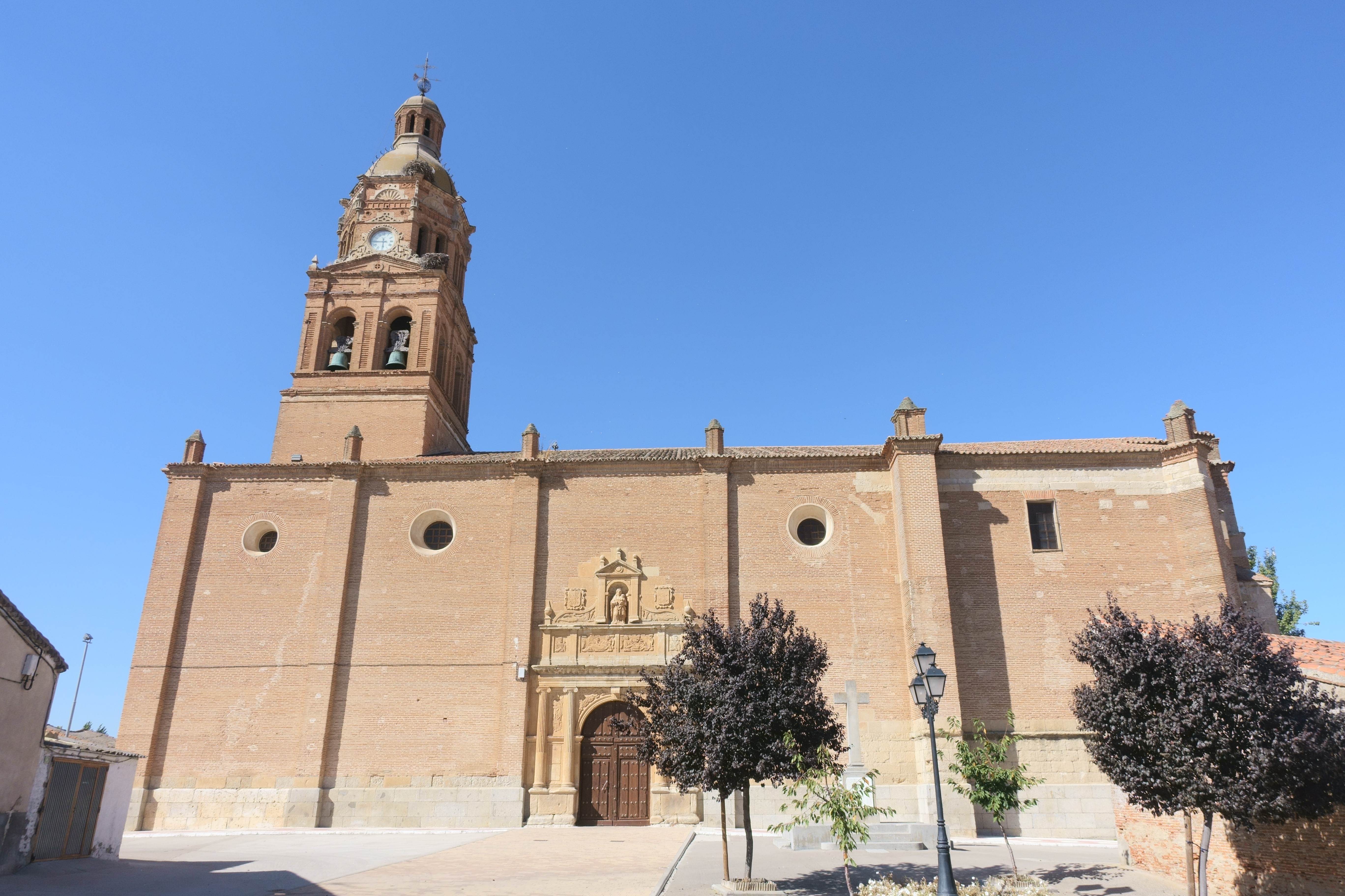 Iglesia de Santa María de los Caballeros, Fuentelapeña (Zamora, España).